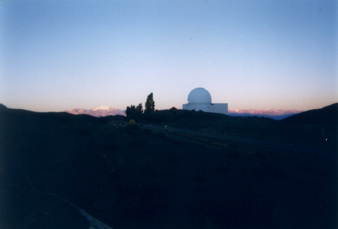 Photo de la coupole à l'observatoire El Leoncito (CASLEO).